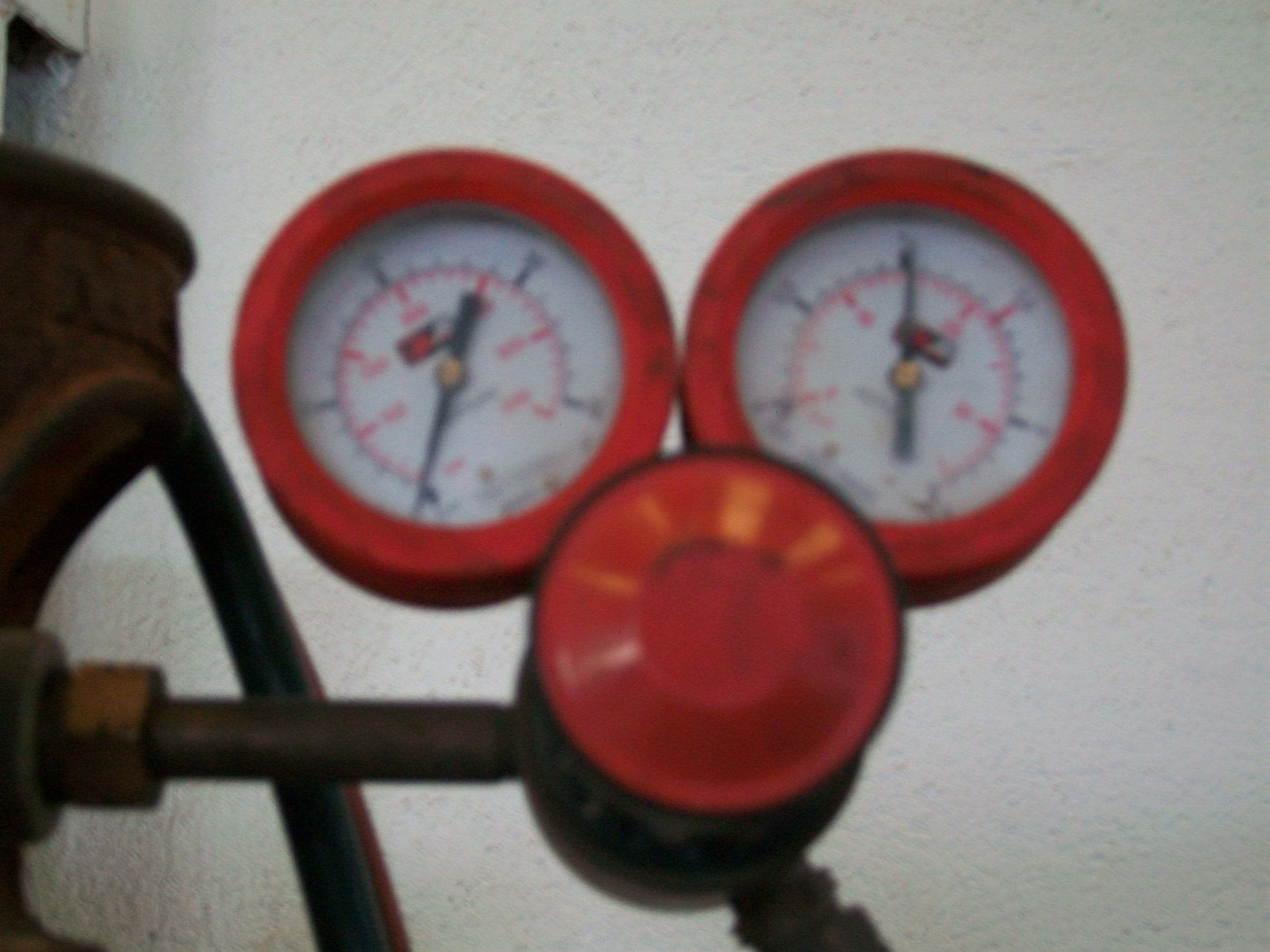 Image de un manorreductores acetileno